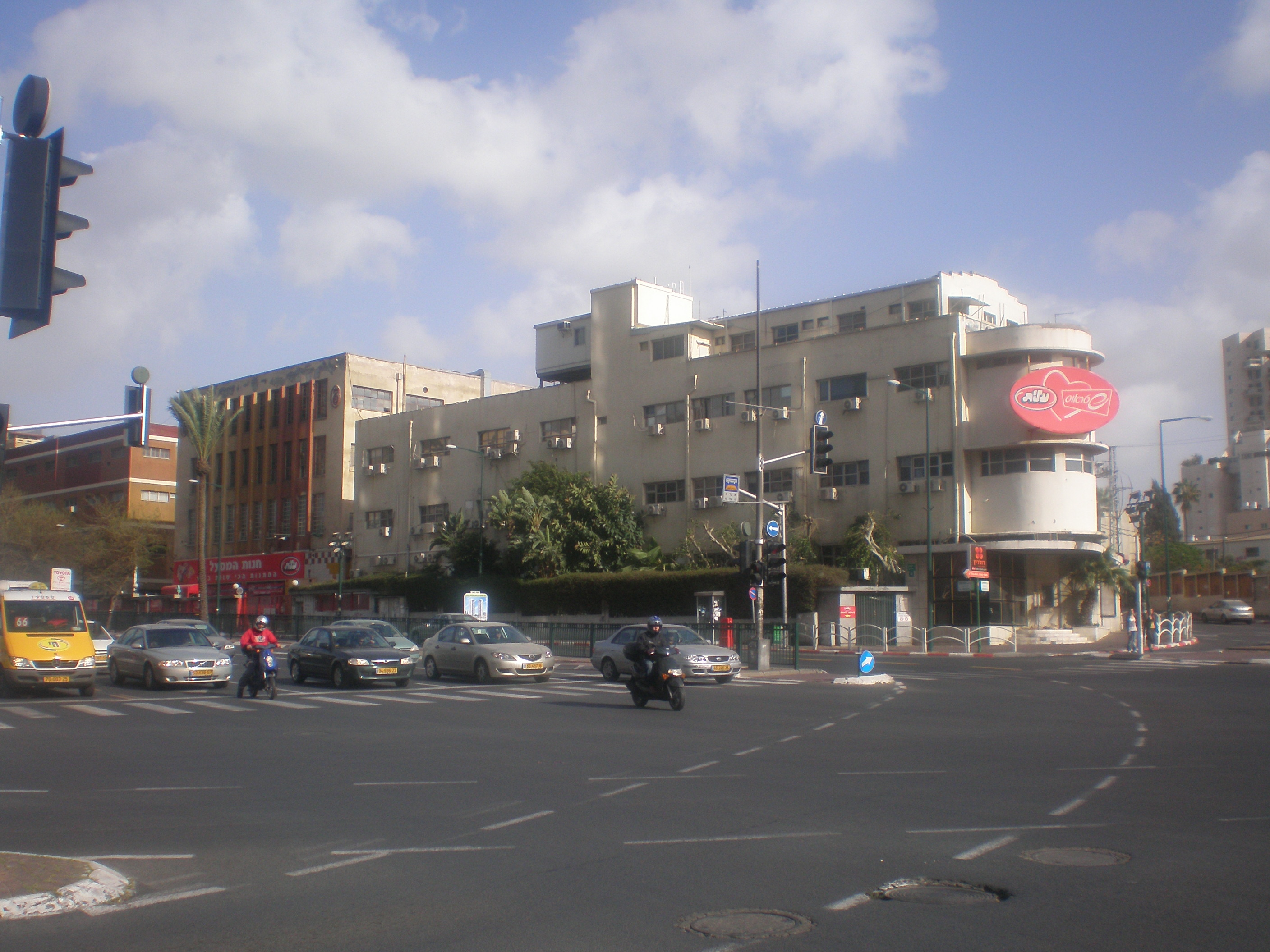 Elite junction, Ramat Gan